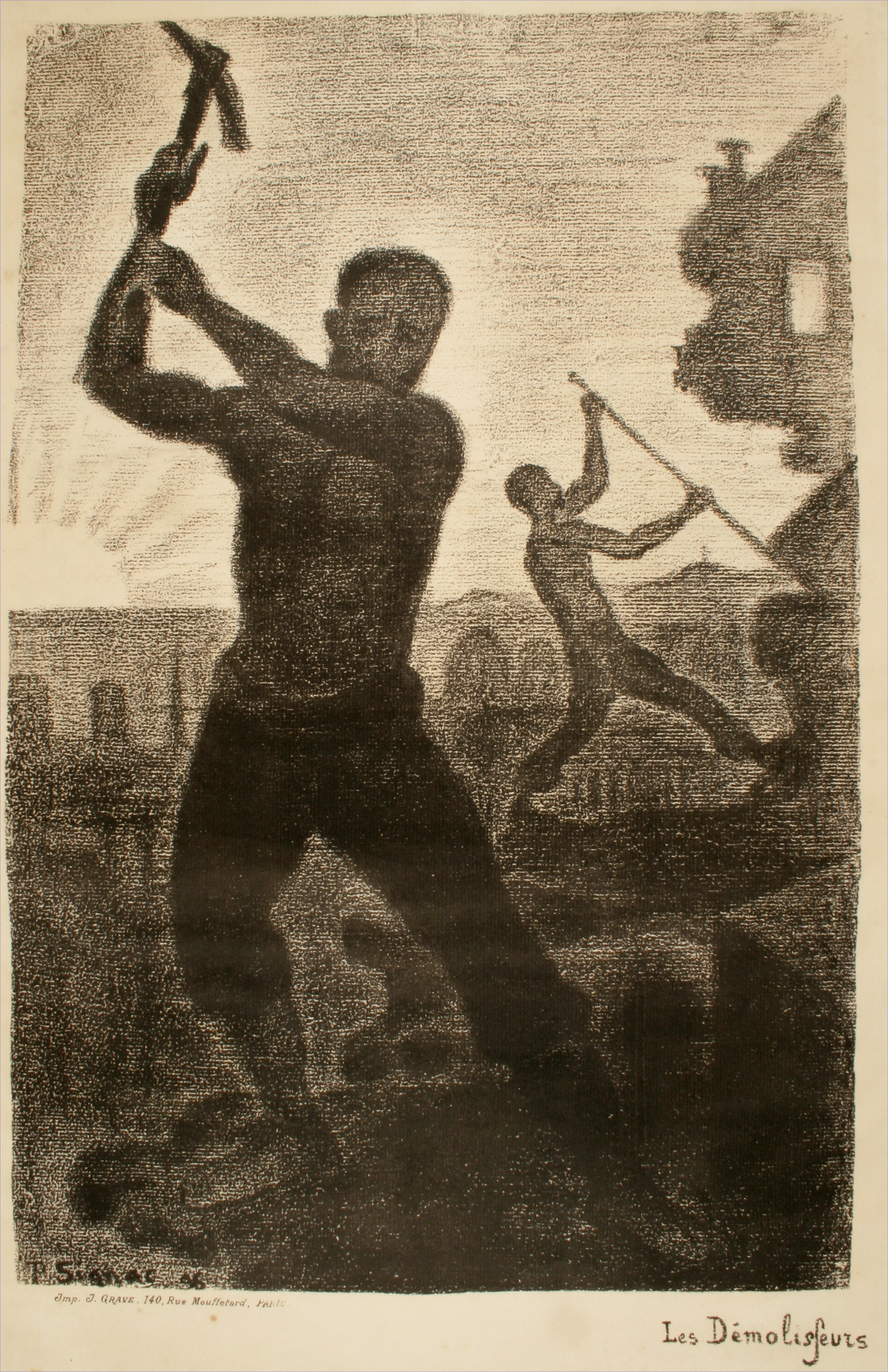 Paul Signac, Les Démolisseurs, 1896 - Lithography